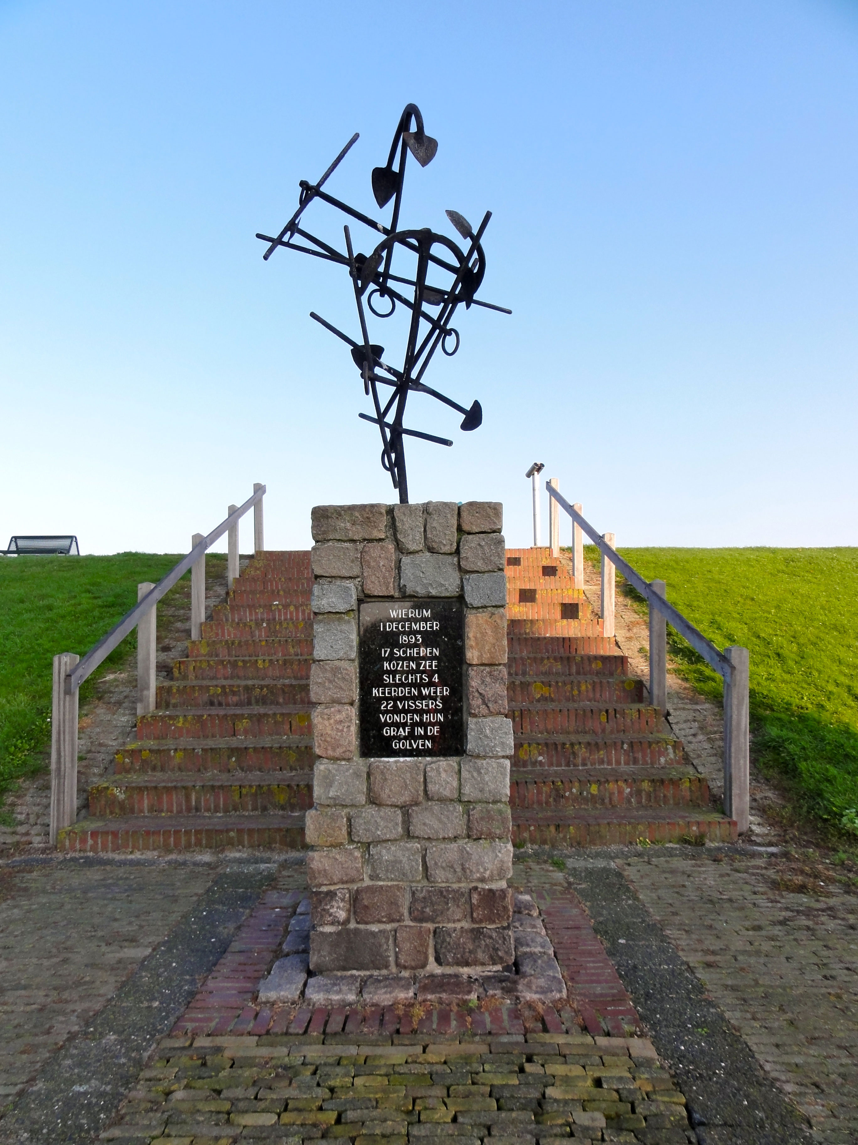 Vissersmonument in Wierum door G.J. de Weert